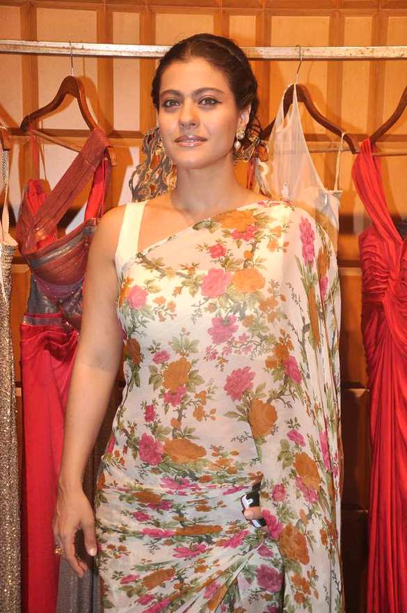 Kajol at Shantanu-Nikhil's store launch